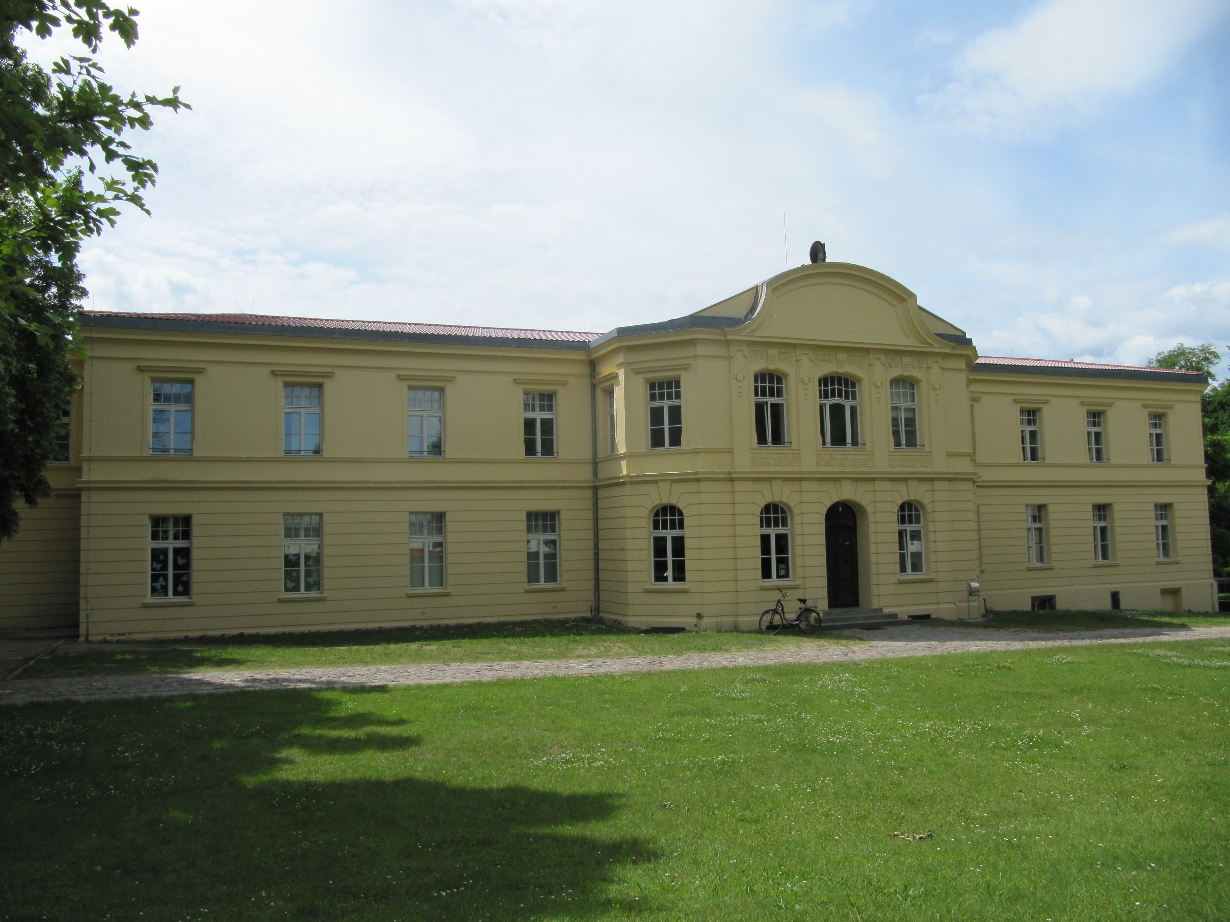 Das Schloss Gerswalde in der Uckermark, Deutschland